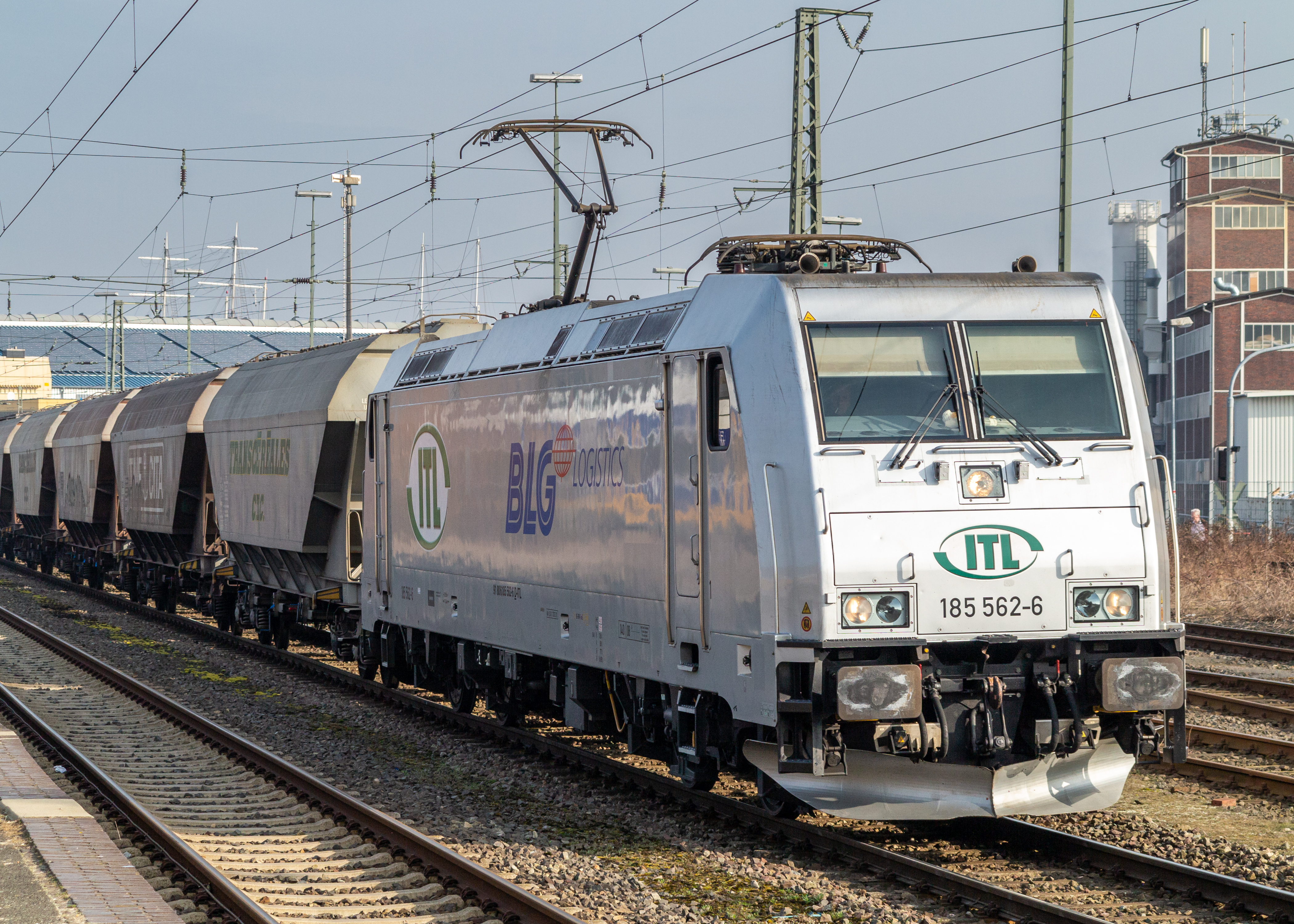 ITL-Lok 185 562 mit Schüttgutwaggons in Brake an der Unterweser